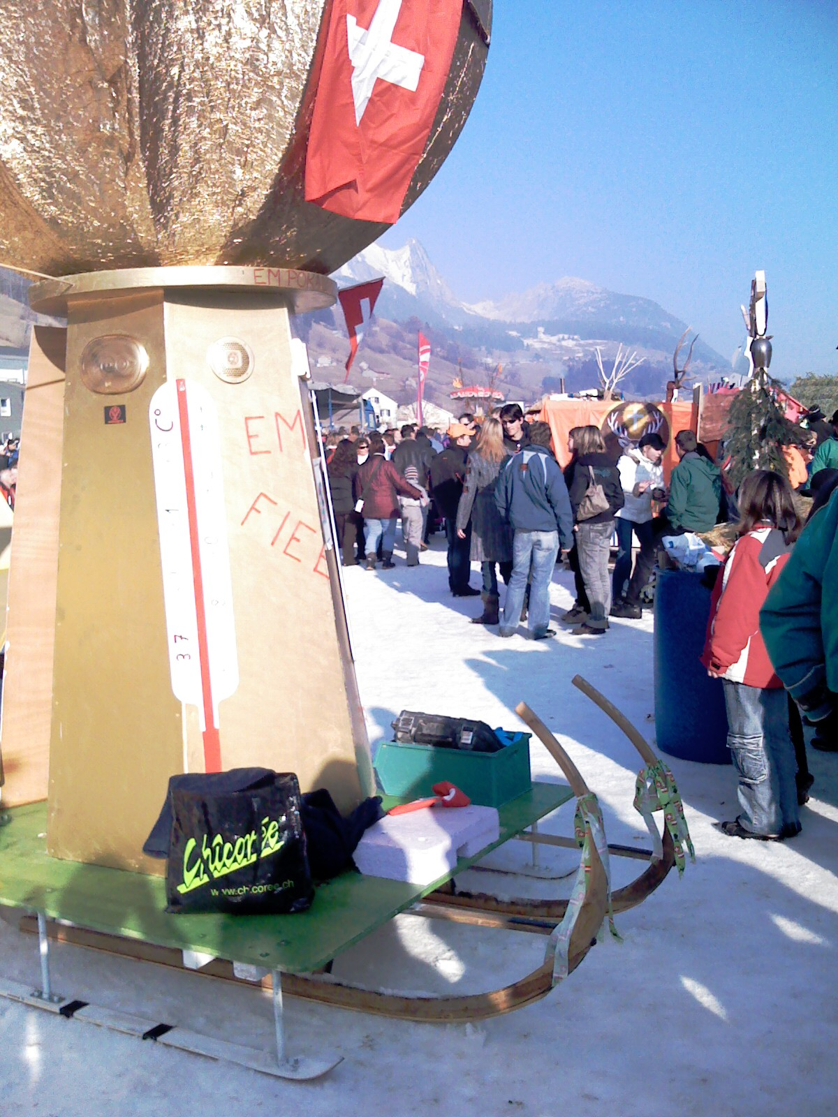 Horn sledge race at Alt St. Johann - Kornsledkonkurso Malnov-Sankt-Johano